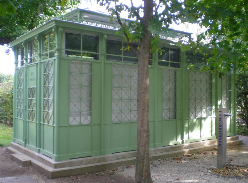 Öffentliche Bedürfnisanstalt im Schlosspark von Schönbrunn im 13. Wiener Gemeindebezirk.